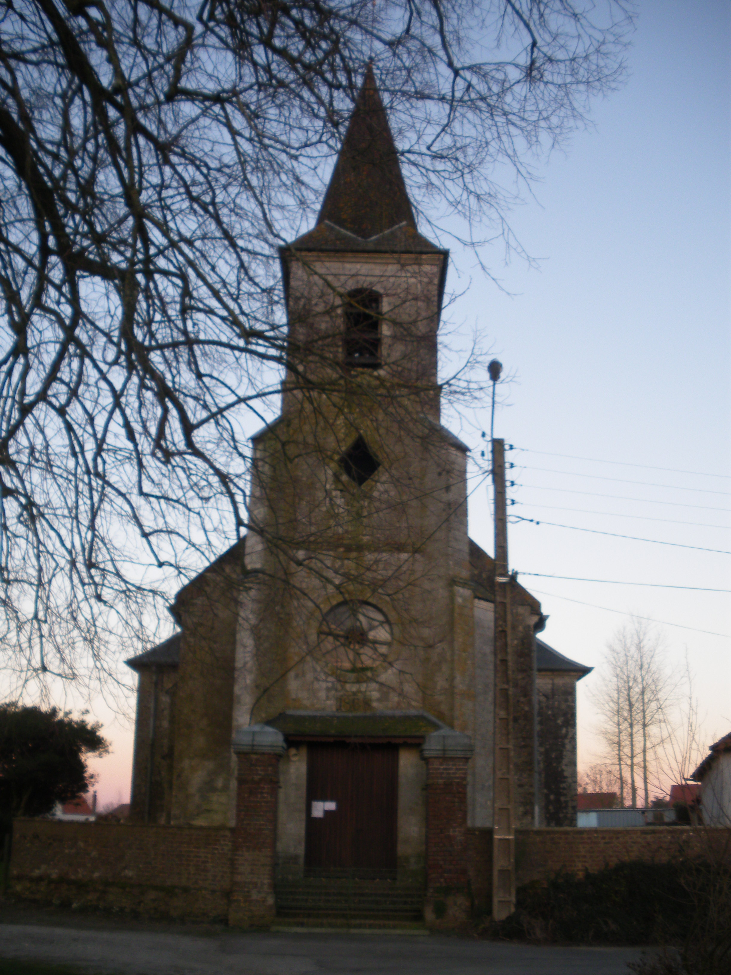 Vue de l'église Saint-François d'Assise de Chériennes.